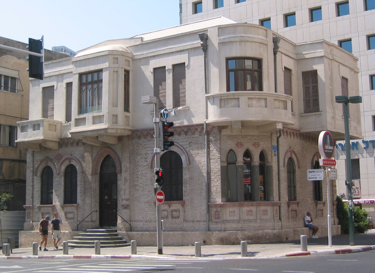 Akiva Arie Weiss house, Tel Aviv